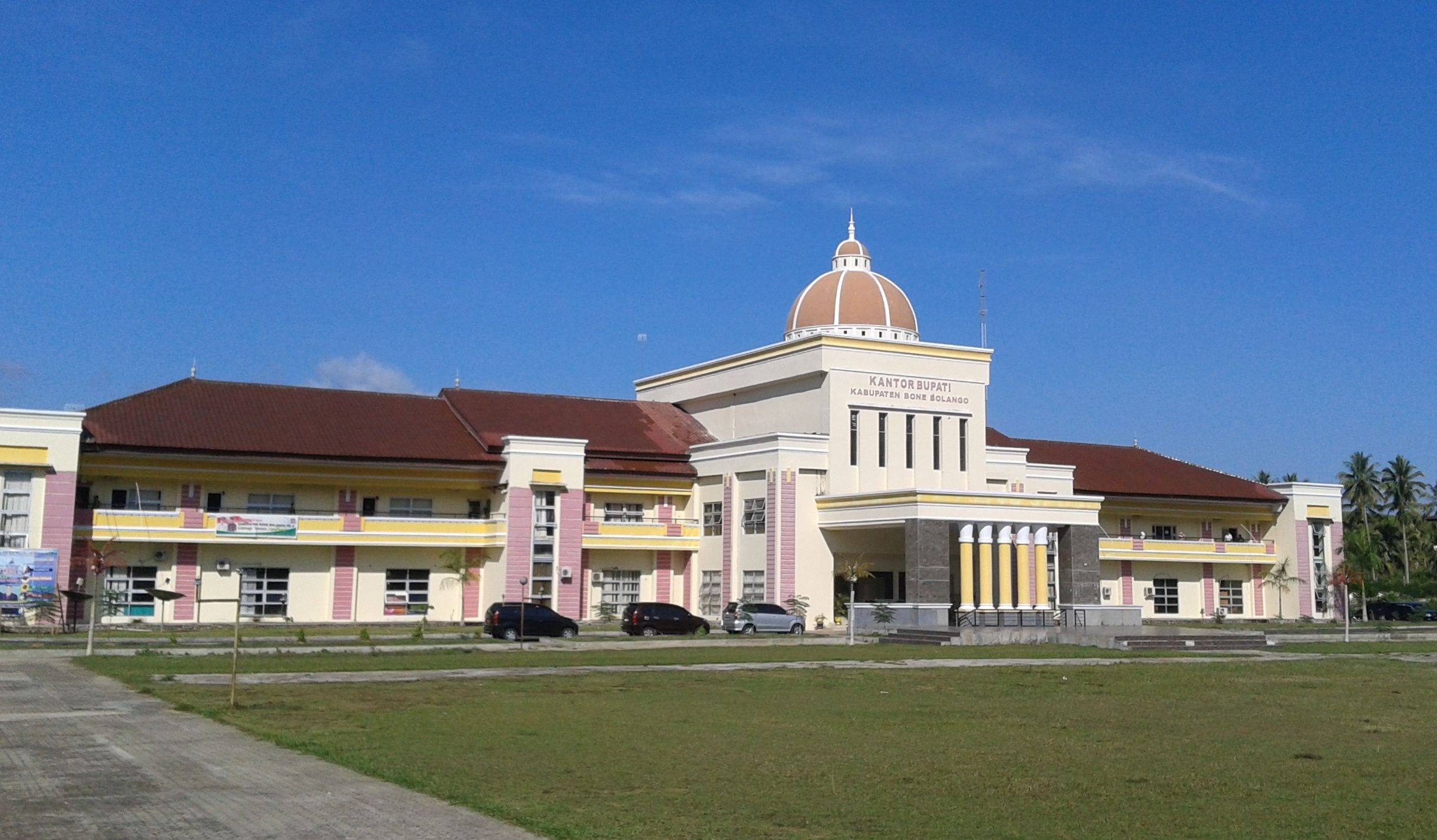 Foto Kantor Bupati Bone Bolango.